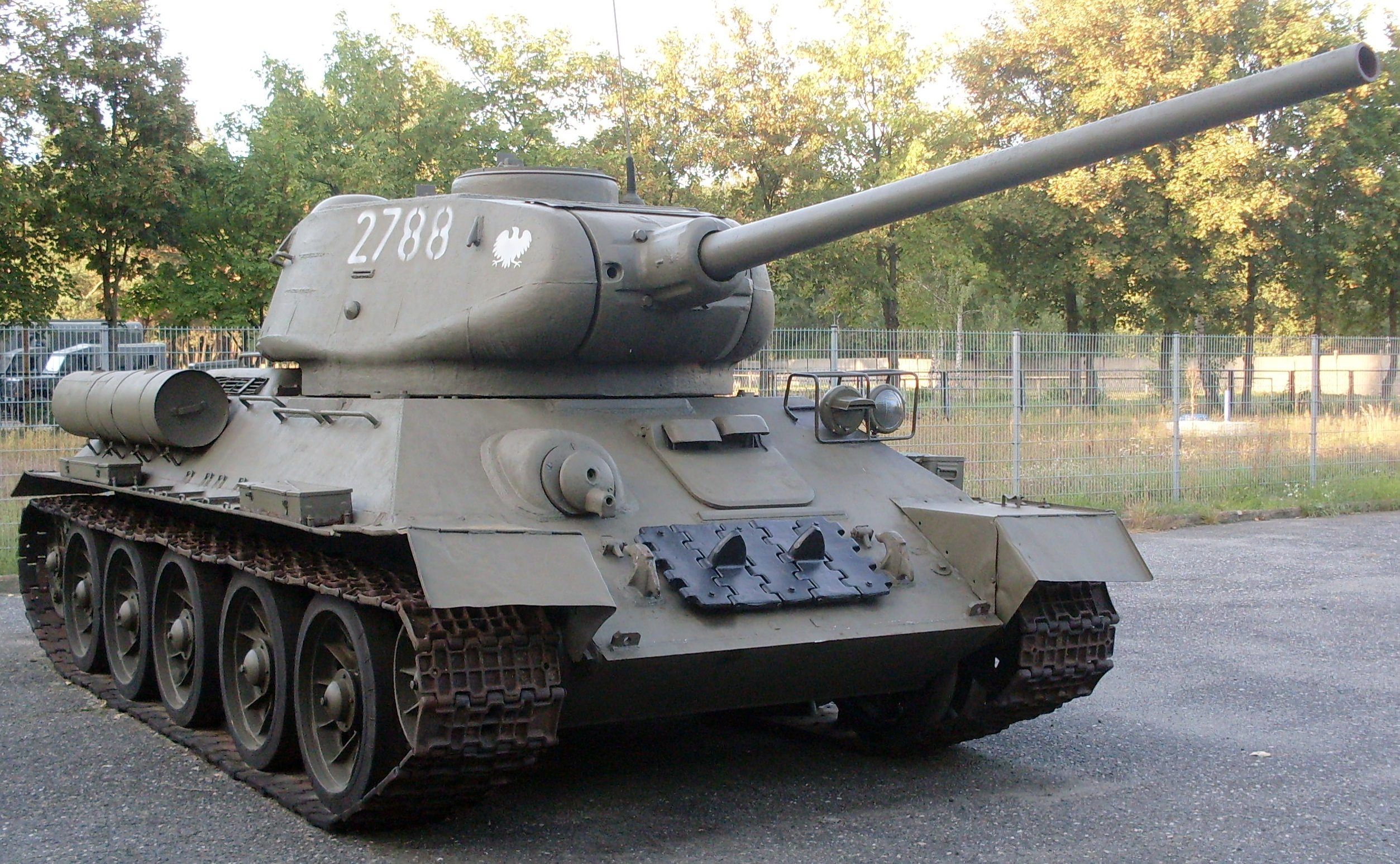 Czołg T34/85